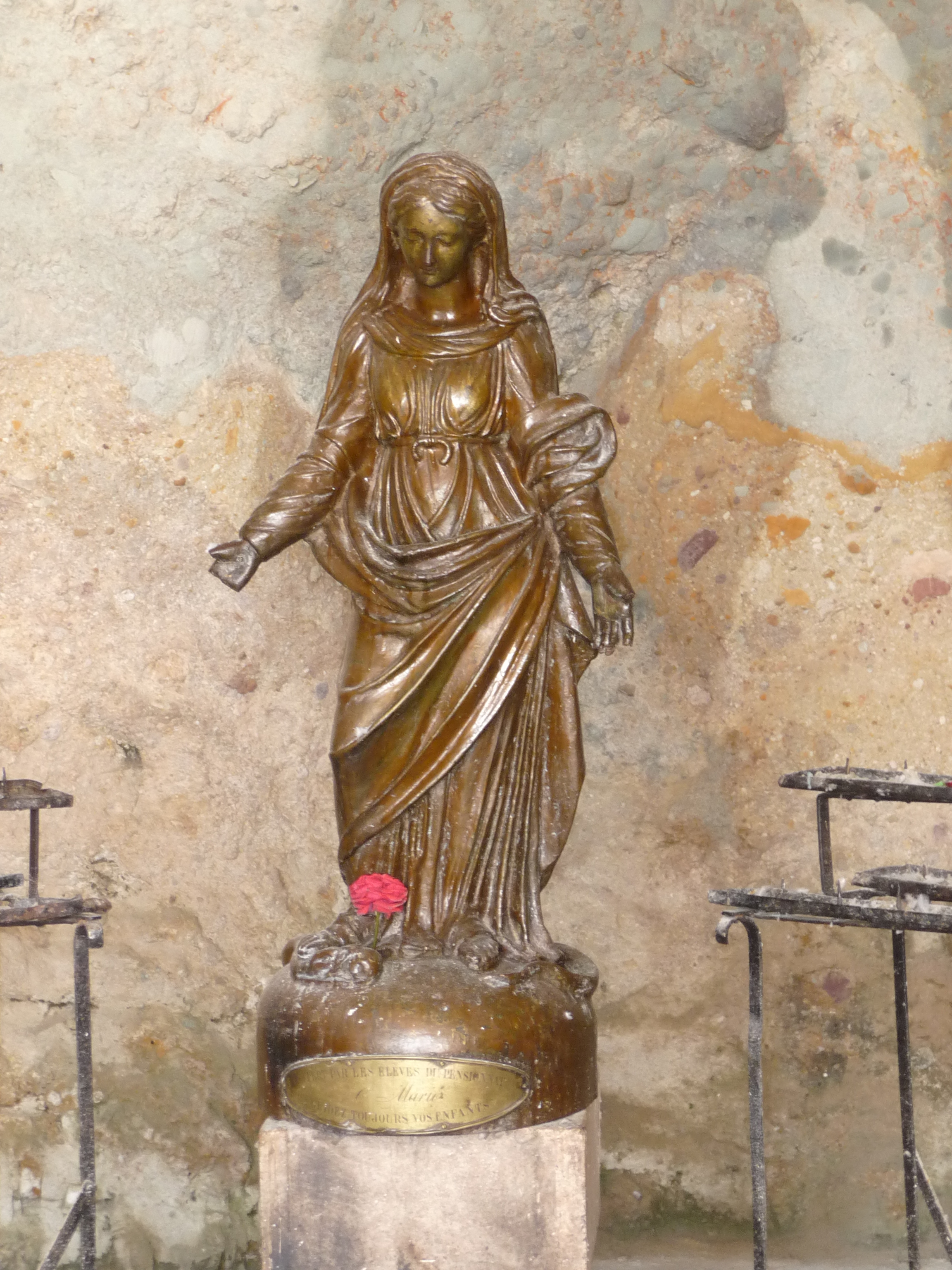 Statue en bronze d'environ 1m10 de haut (sans son socle) avec une inscription peu lisible (sous toute réserve) : Offert par les élèves de pensionnat C Marie Aimez toujours vos enfants